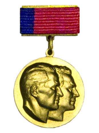 Медаль лауреата Державної премії РСФСР імені братів Васильєвих